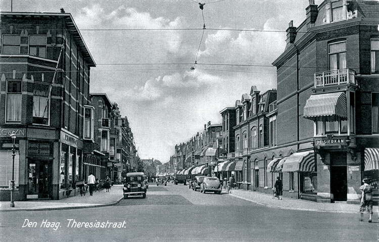 Theresiastraat, Den Haag. De foto is genomen bij de kruising van deze straat met de Laan van Nieuw Oost Indië.